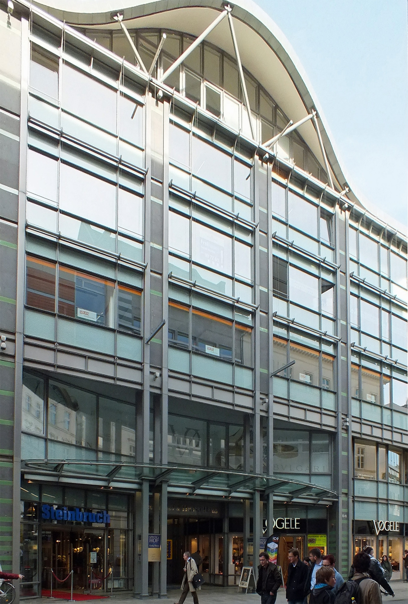 Das Hansa-Haus in Leipzig